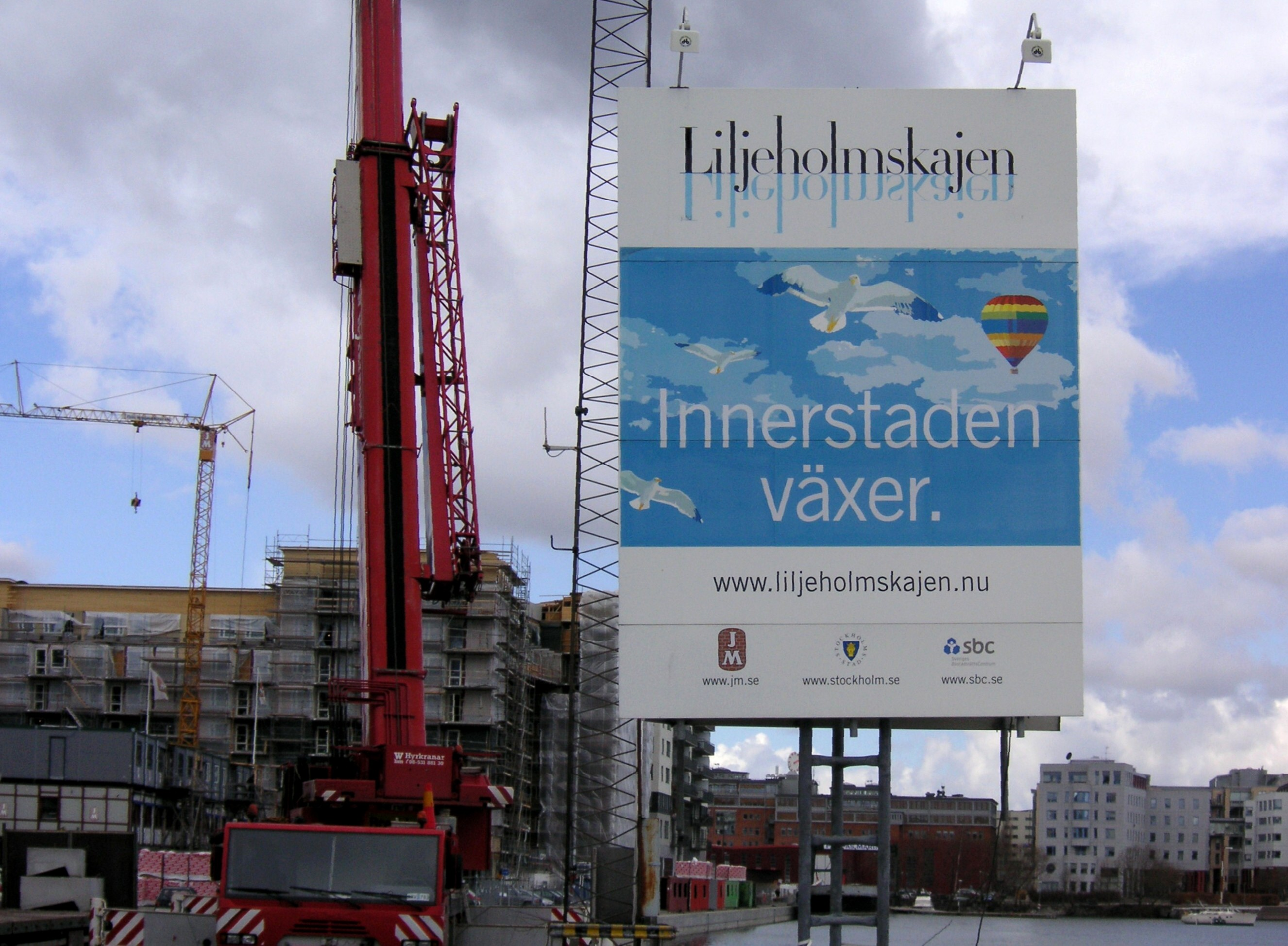 Bostadsområder "Liljeholmskajen" i Stockholm